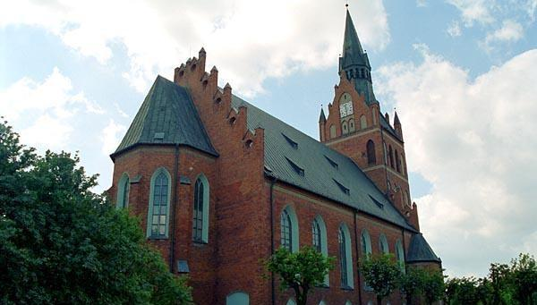 Kościół Najświętszego Serca Pana Jezusa w Ełku